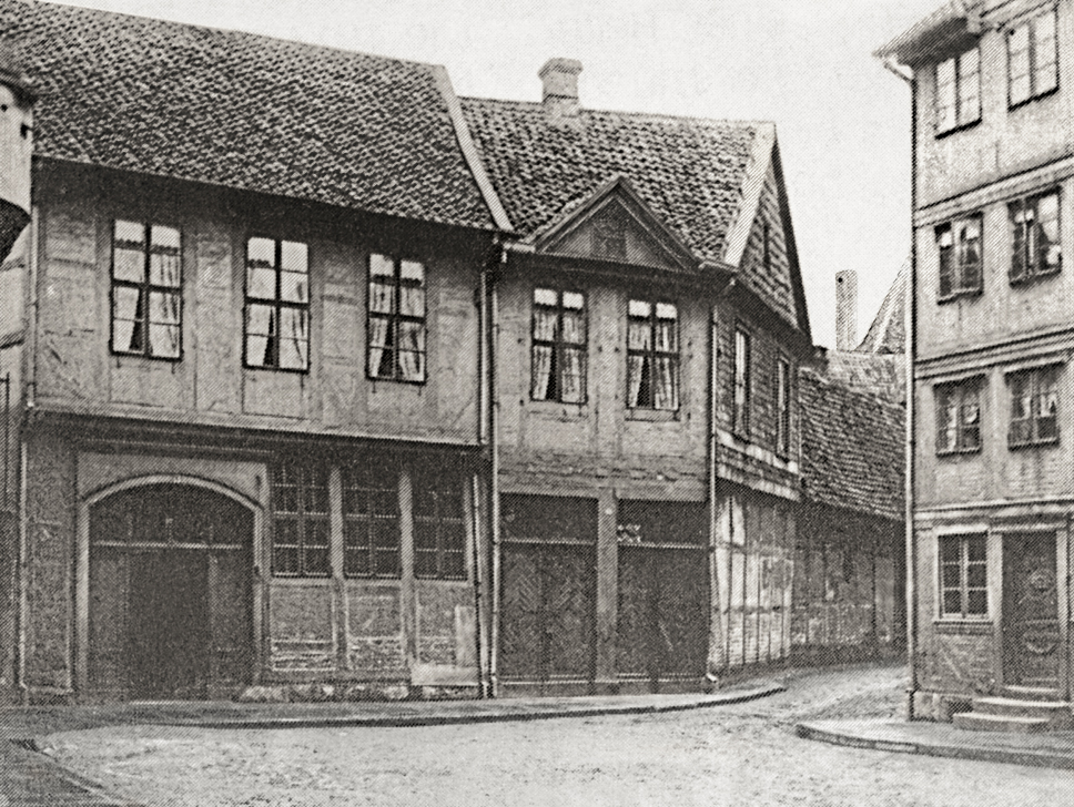 Braunschweig, Eingang (links) zum alten Gebäude der Städtischen Höheren Töchterschule, dem heutigen Gymnasium Kleine Burg